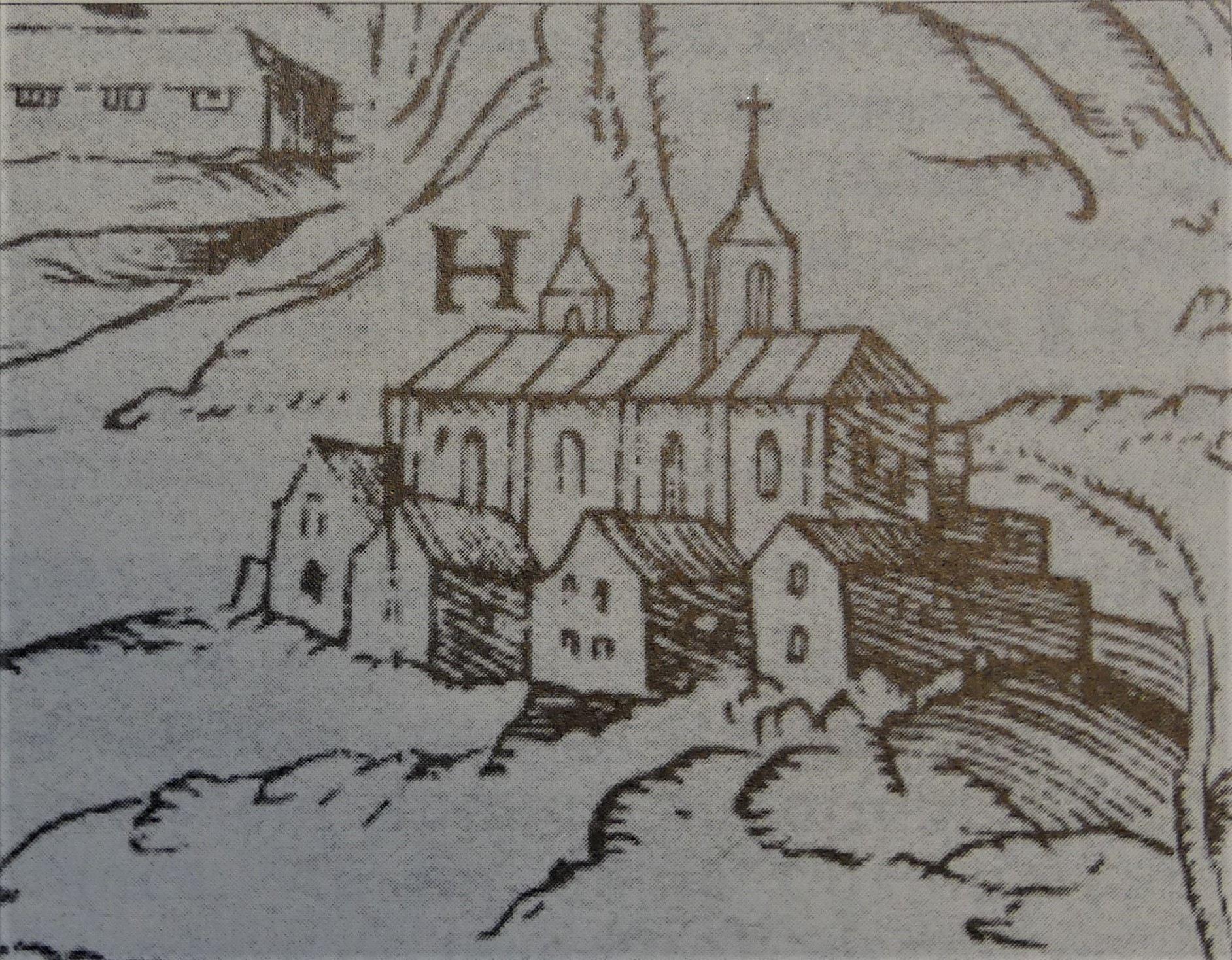 Le couvent des Cordeliers de Périgueux : extrait du dessin de 1575 de François de Belleforest représentant Le vray Pourtraict de la ville de Perigueux.